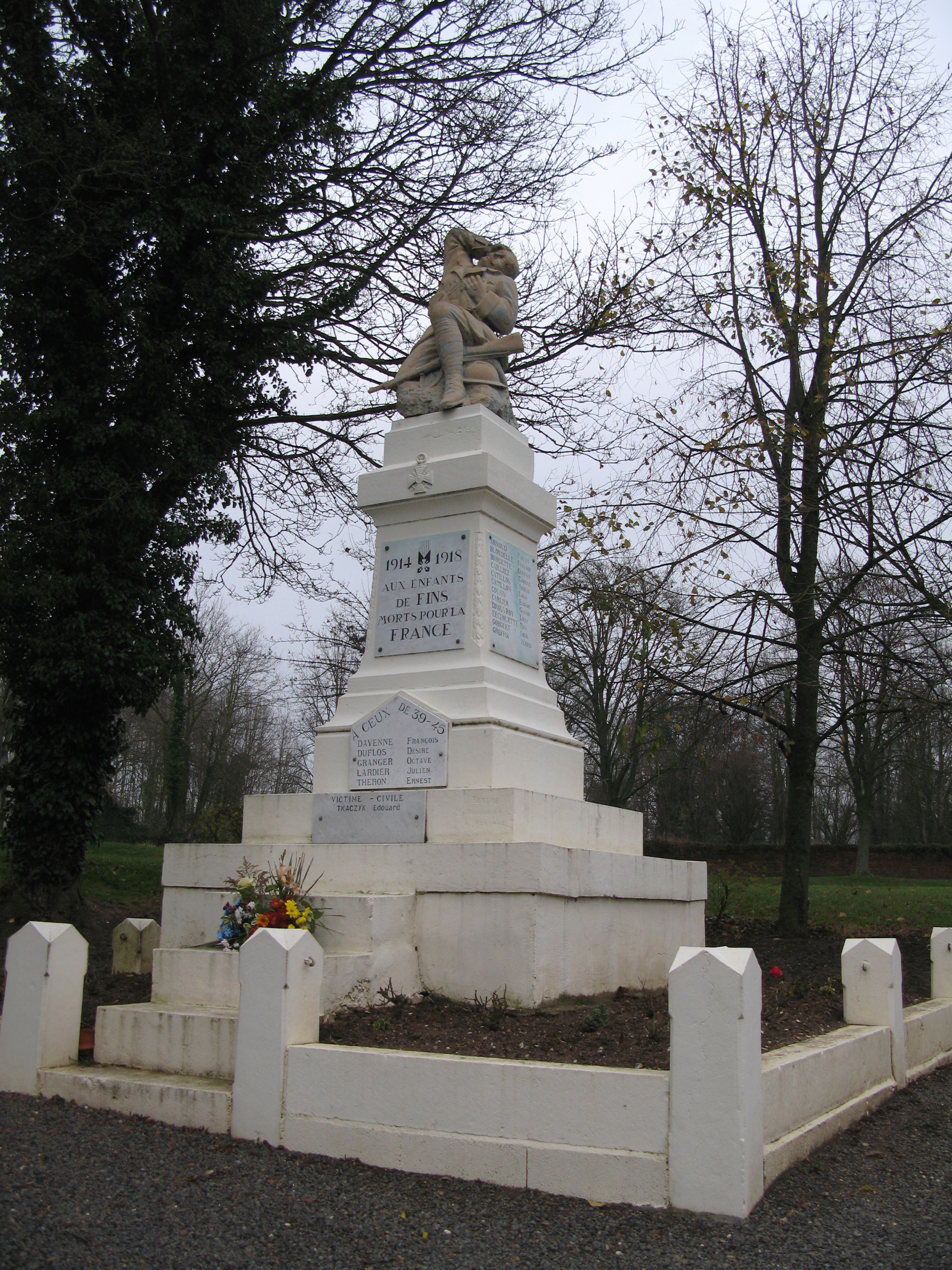 Fins (Somme, France) - Le monument aux morts. .